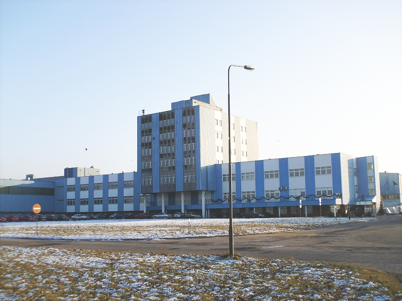 Legnickie Przeds. Wodociągów i Kanalizacji